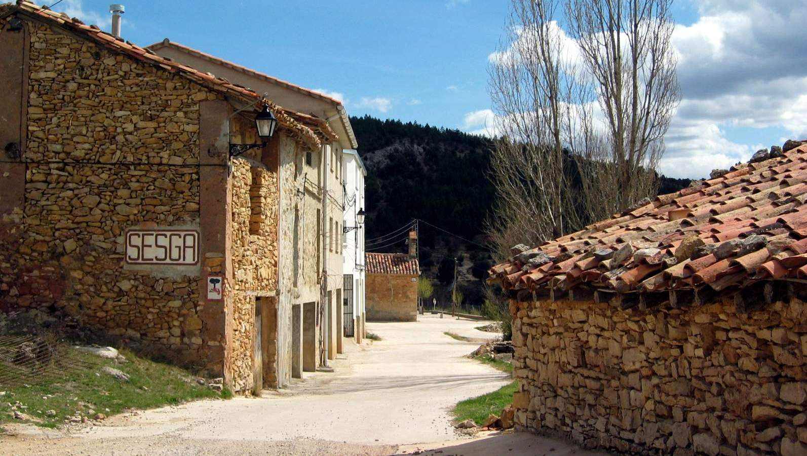 Entrada a la aldea de Sesga, Ademuz (Valencia), con detalle del cartel.